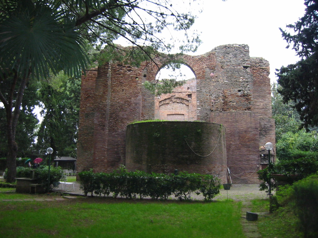 Mausoleo di St Urbano Martire